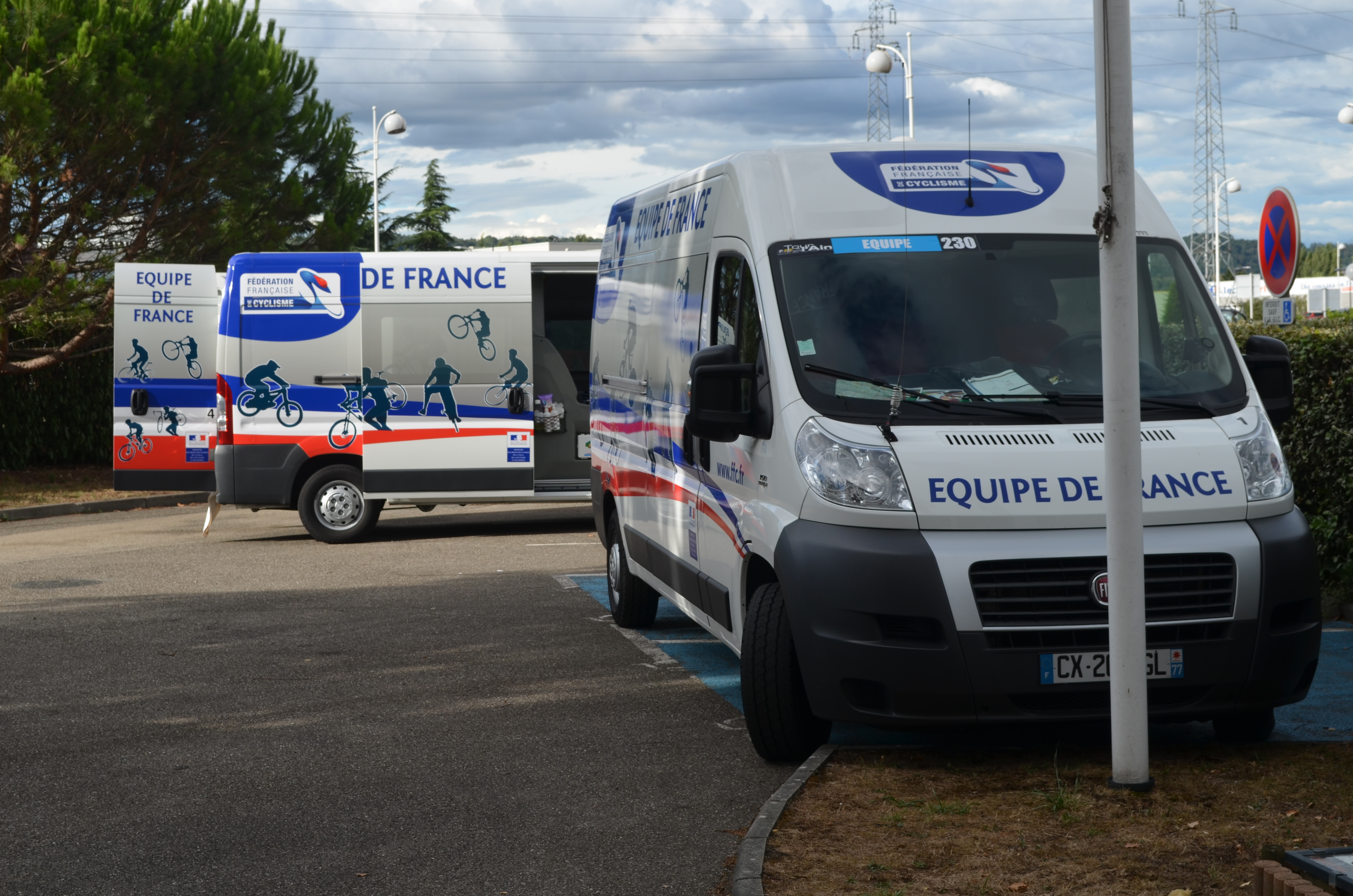 Tour de l'Ain 2015, au soir de la troisième étape.